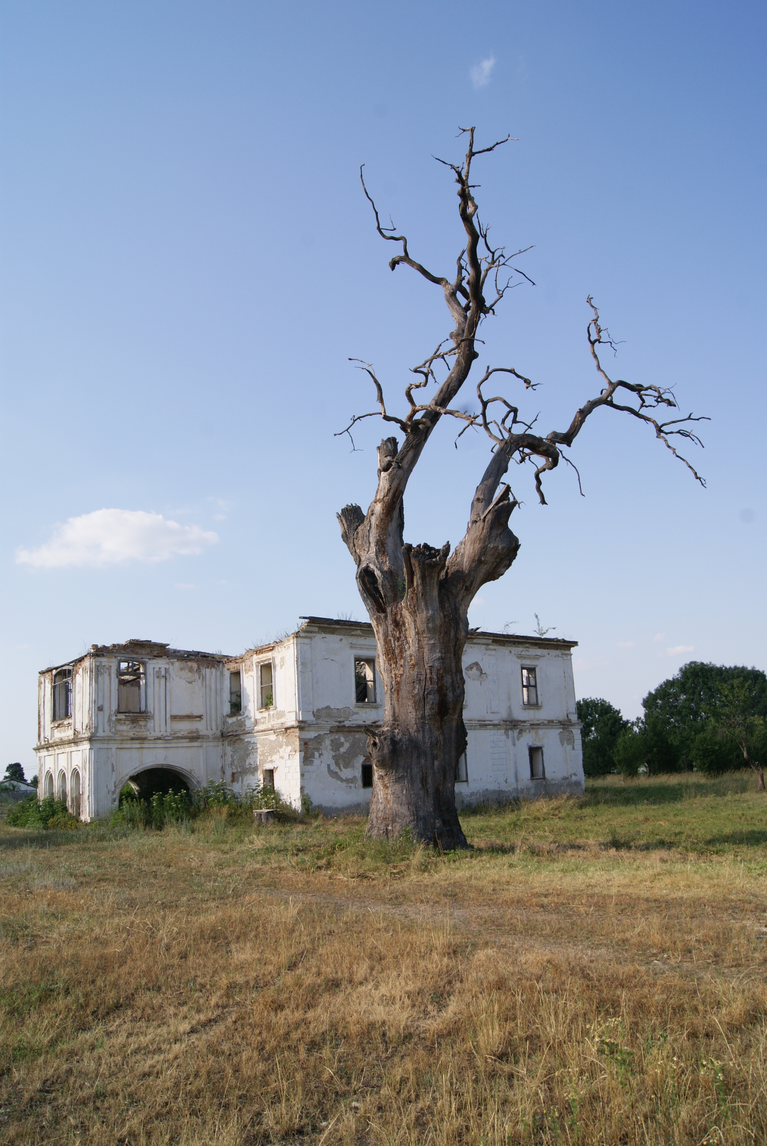 Casa Catargi construită în anul 1842 de către boierul Ştefan Catargi.După expropierea de la începutul anilor '50, ansamblul a fost transformat în sediu C.A.P. fiind utilizat mulţi ani la rând fără a i se face lucrări de reparaţii sau măcar de întreţinere. Un raport din 1978 precizează despre conac ca fiind degradat, grinzile şi acoperişul fiind pe punctul de a se dărâma. Astfel, la începutul anilor '90 întregul ansamblu era deja vandalizat şi dezmembrat bucată cu bucată, starea de degradare înrăutăţindu-se de la an la an. În anul 2006 când moştenitorii intră în sfârşit în proprietatea conacului aceştia constată că, practic, el nu mai există. 01